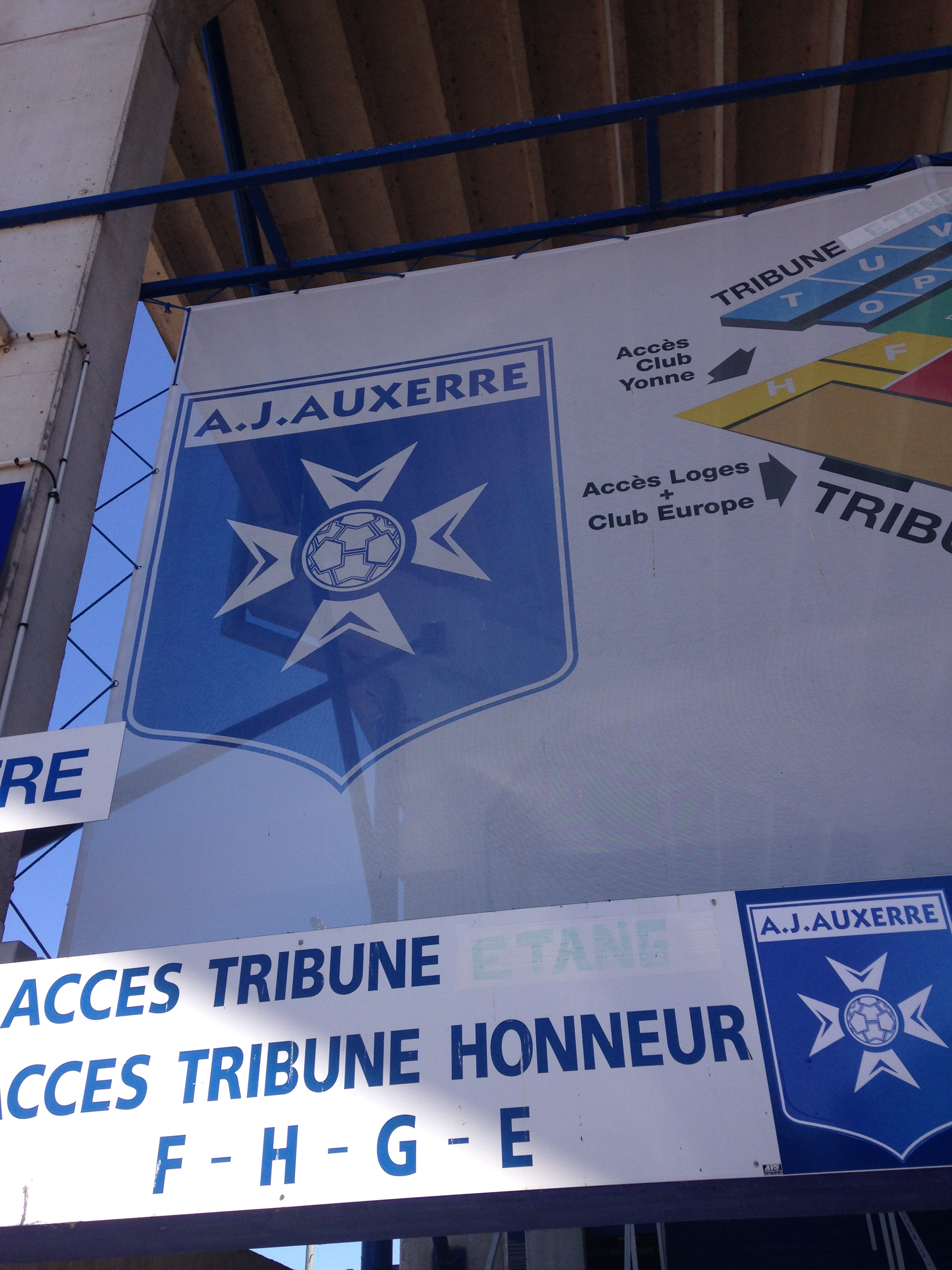 Stade AJ Auxerre